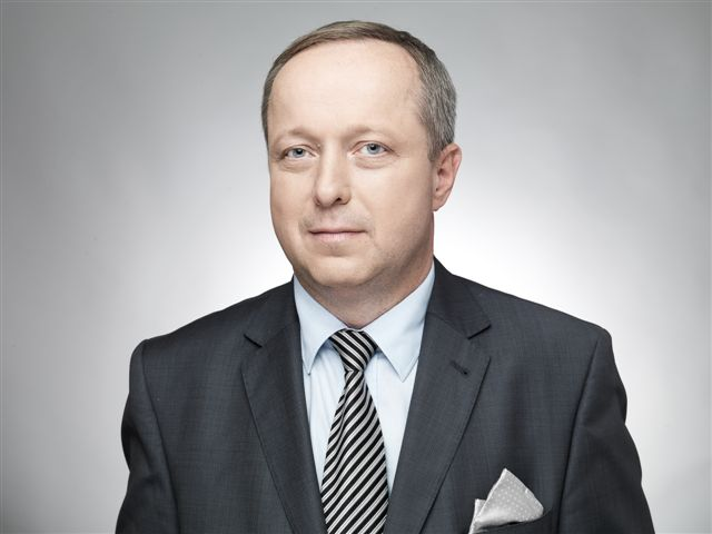 Witold Spirydowicz